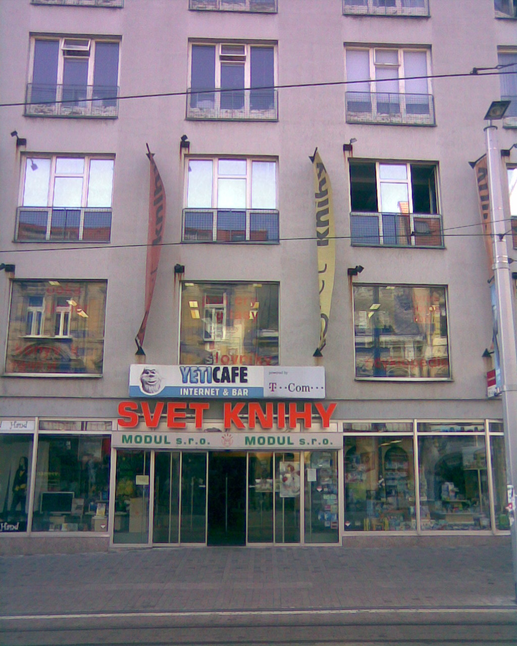 Obytný_a_obchodný_dom_Schön